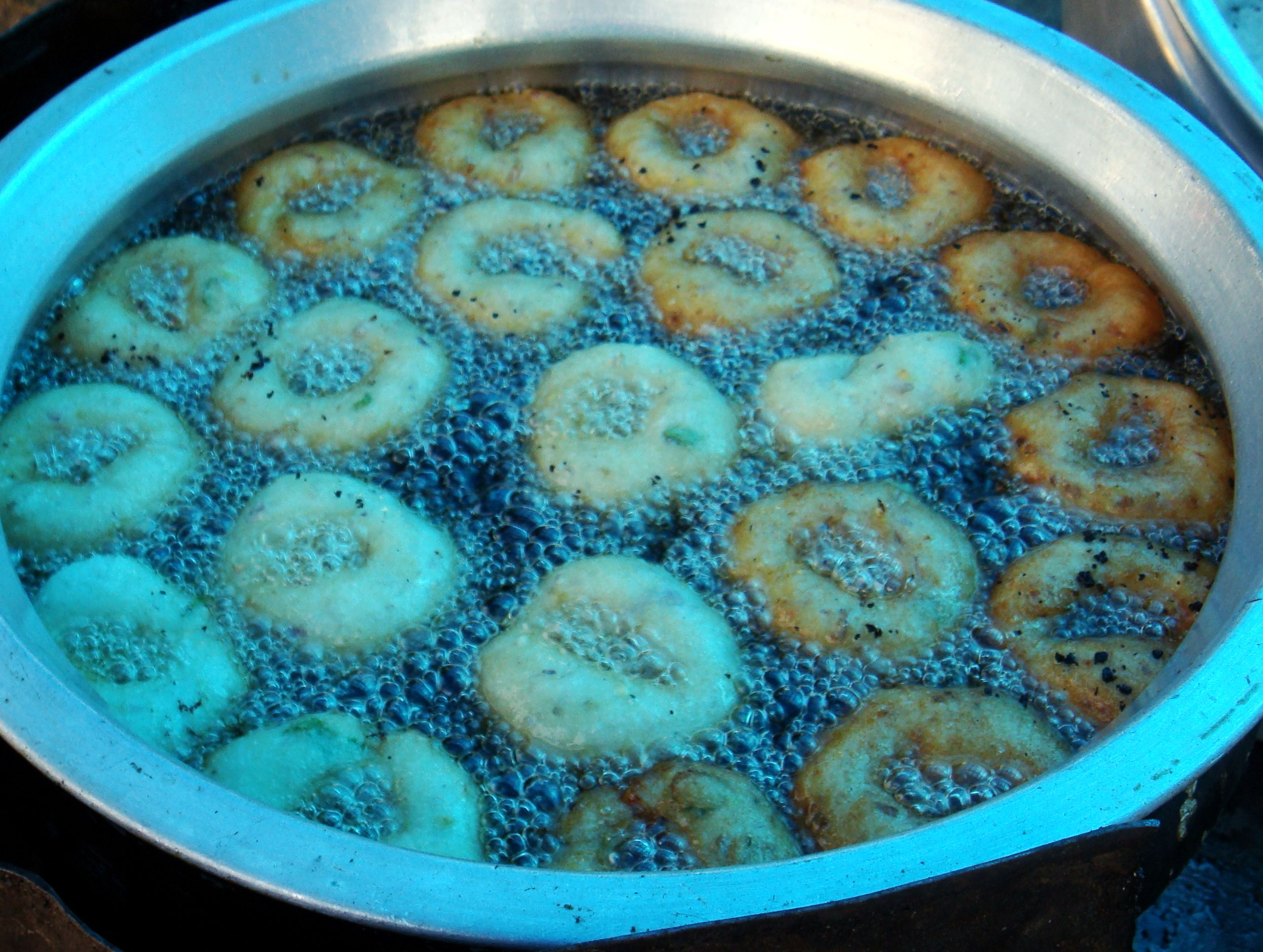 ഉഴുന്നുവട